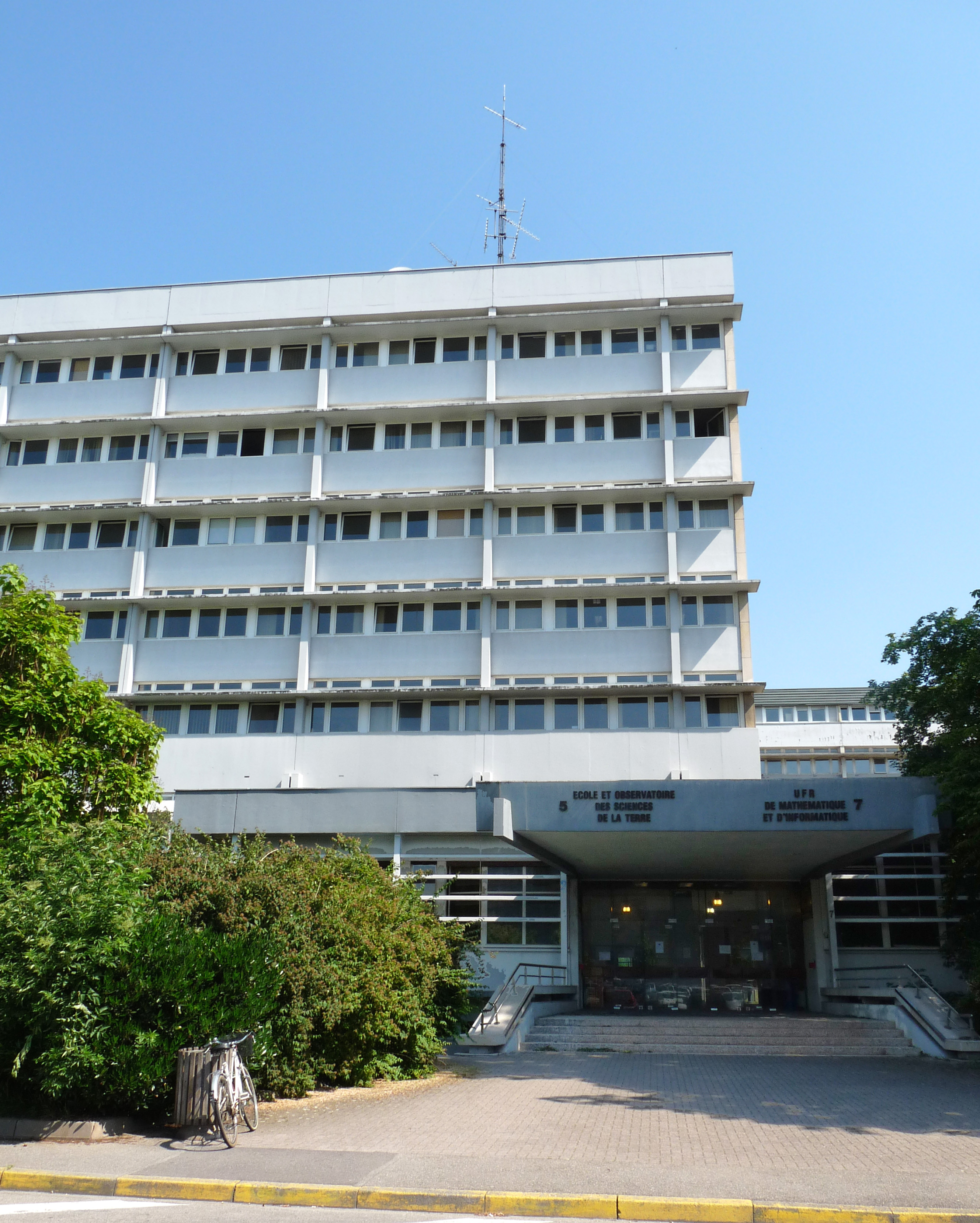 Ecole et observatoire des sciences de la terre (EOST)Strasbourg